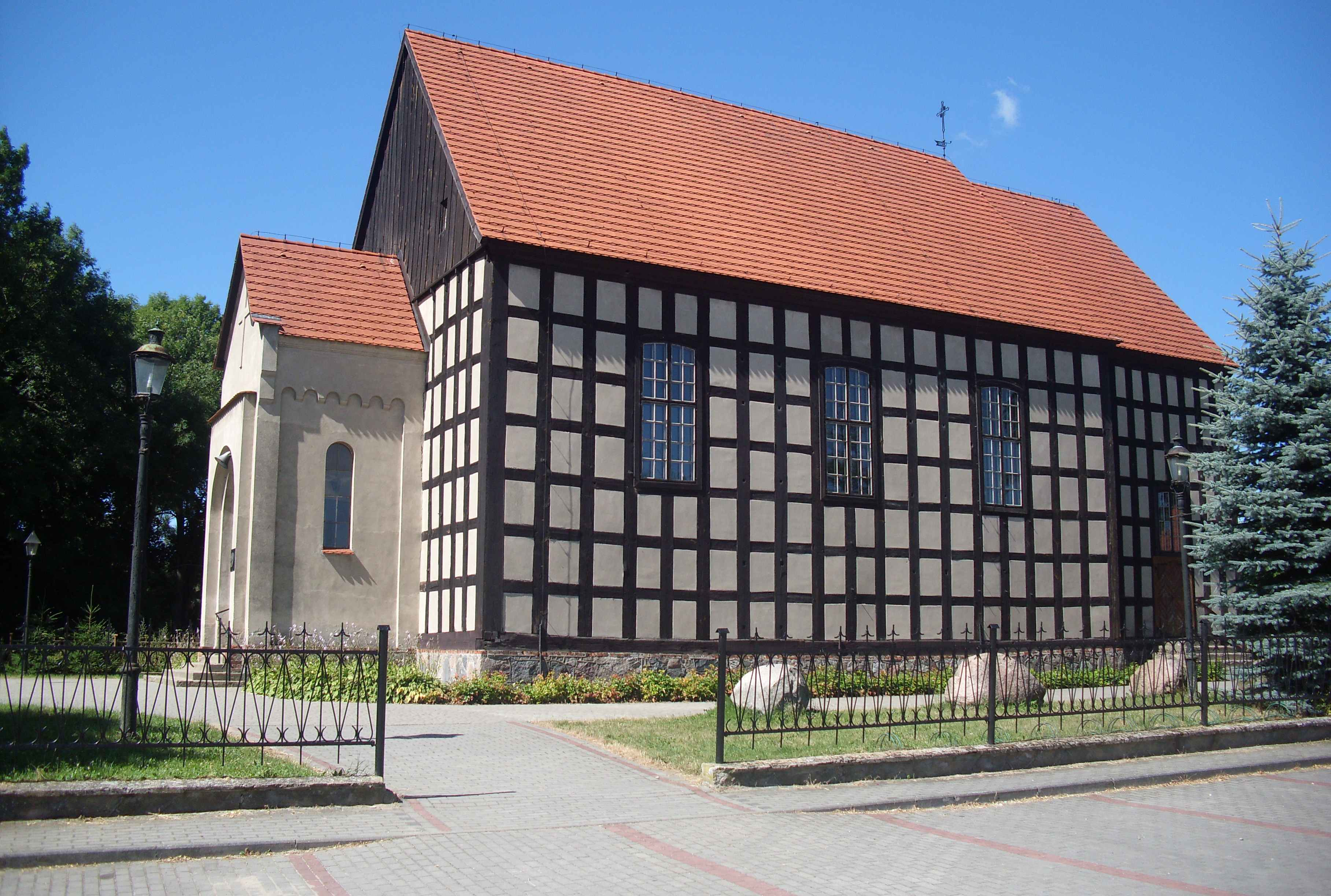 Sypniewo - zespół kościoła p.w. św. Katarzyny - kościół, drewn., 1781 (zabytek nr A/779/1-3)